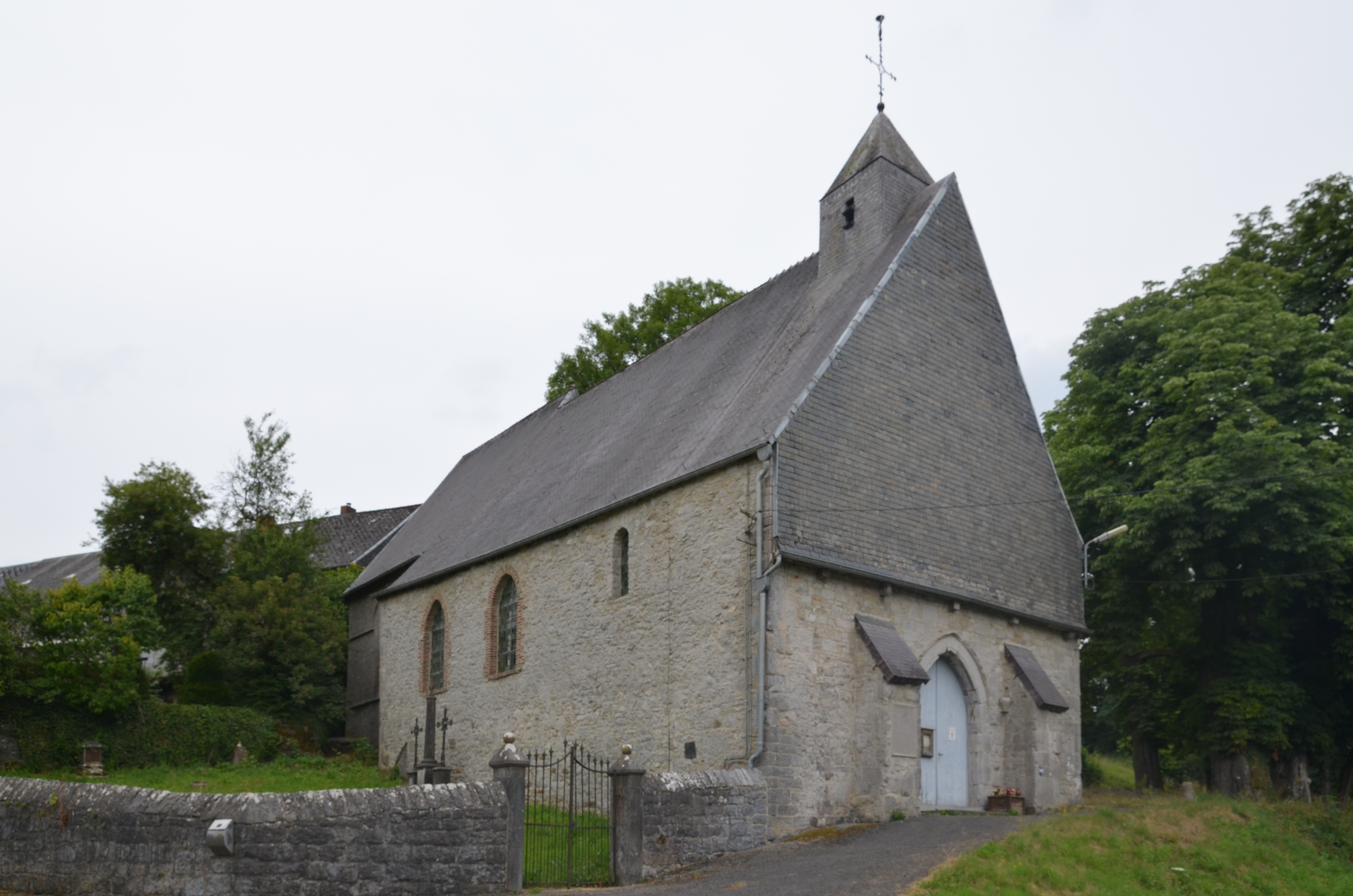 Boutonville (Chimay-Belgique) - église Notre-Dame.